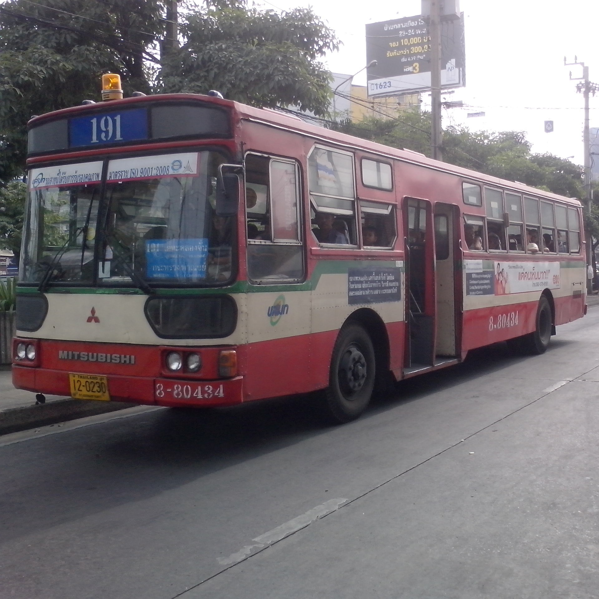 bus no.8-80434